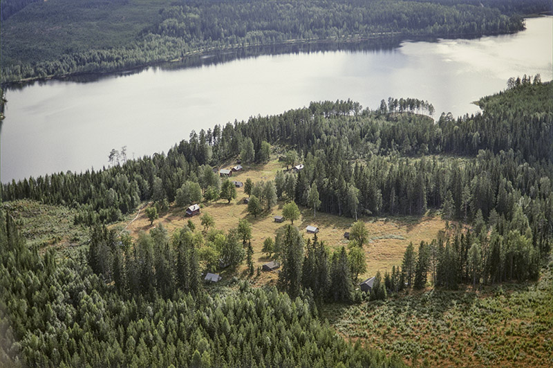 Kårebolssätern (skrivs även Kårebolsätern) vid Kårebolssjön. Fäbod RAÄnr Norra Ny 1256 och boplats RAÄnr Norra Ny 1001:1. Bilden är tagen mot (väderstreck): SV Nyckelord: Flygbilder, Riksintressen Kategori: Fäbodsmiljö Kårebolssätern